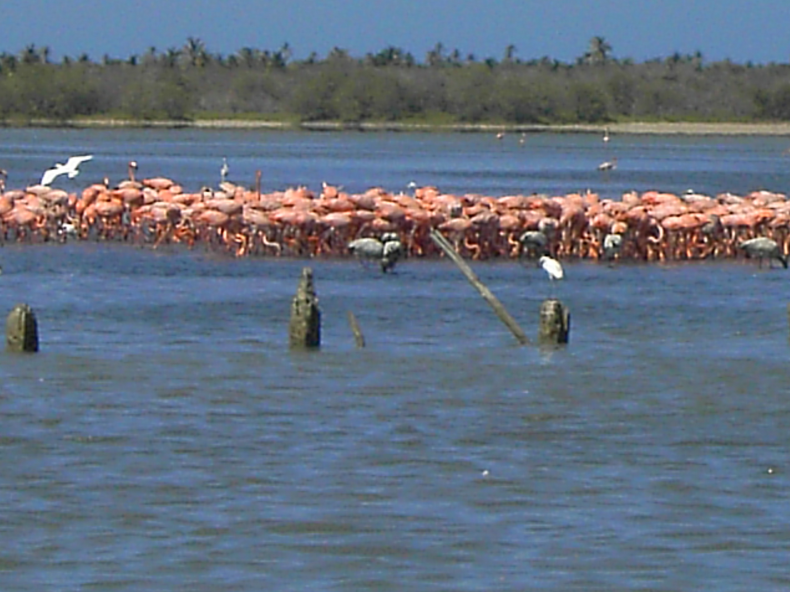 Flamingos en cuare